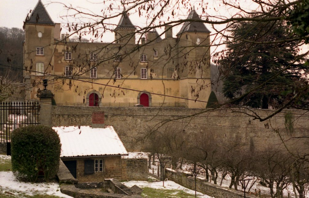 Château de la Barollière, à Limonest (Rhône, France) .